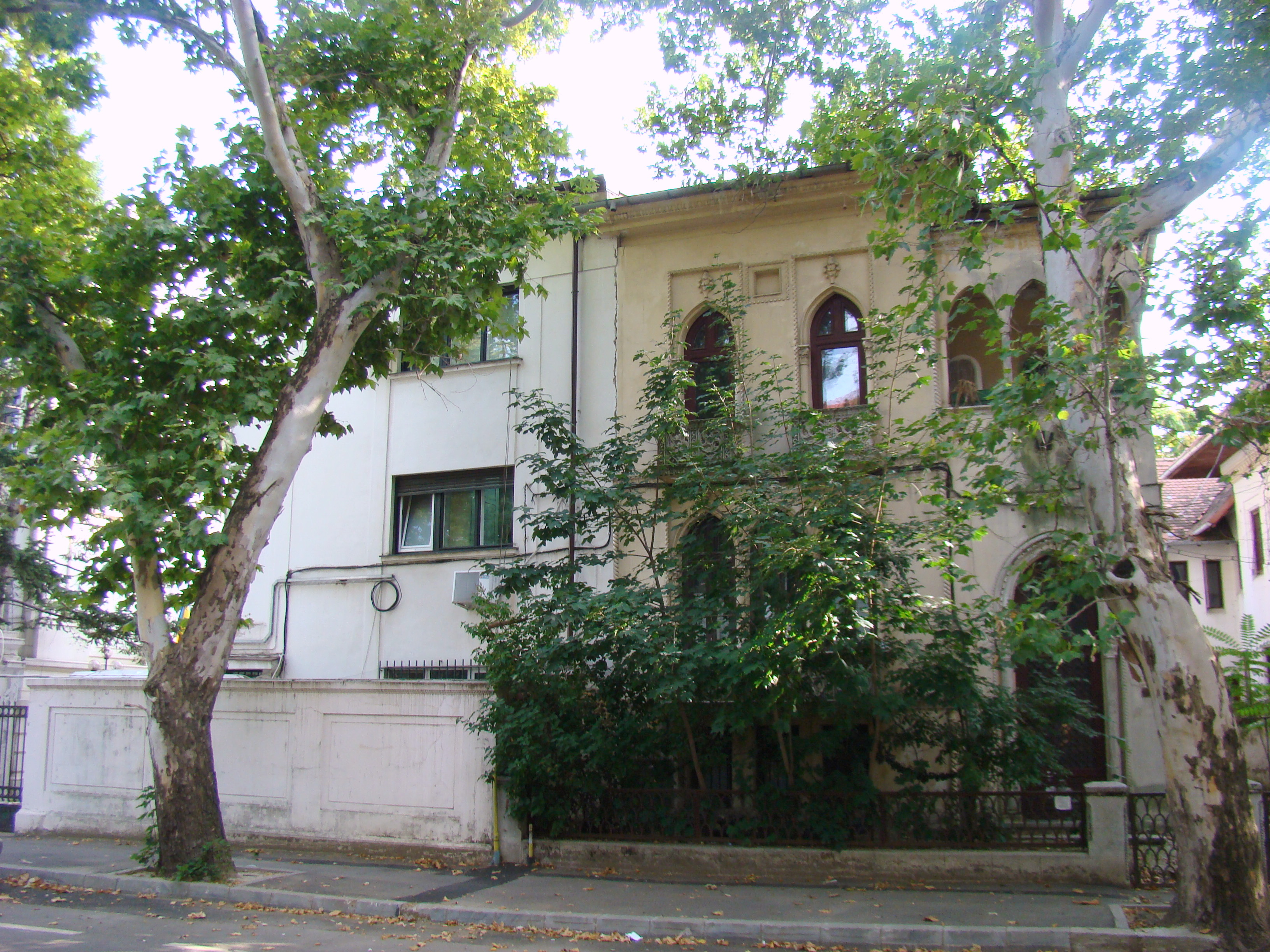 Casă monument istoric, str. Aleea Alexandru, nr. 35